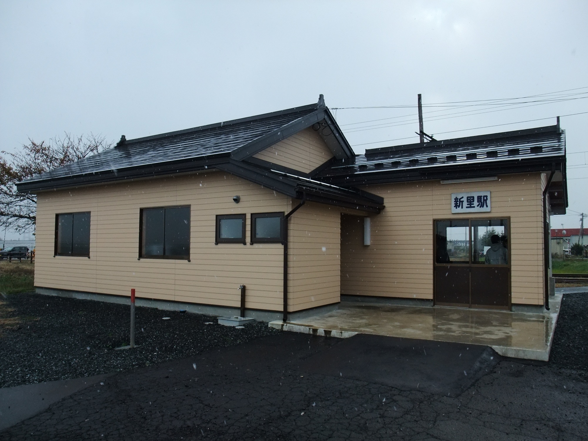 弘南鉄道 新里駅